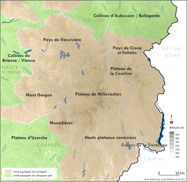 Unités paysagères du plateau de Millevaches et territoires environnants, d'après l'Atlas des paysages du Limousin.